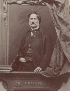 Photo prise dans l'atelier Nadar par Adolphe Dallemagnee, représentant le peintre Charles Lefébvre